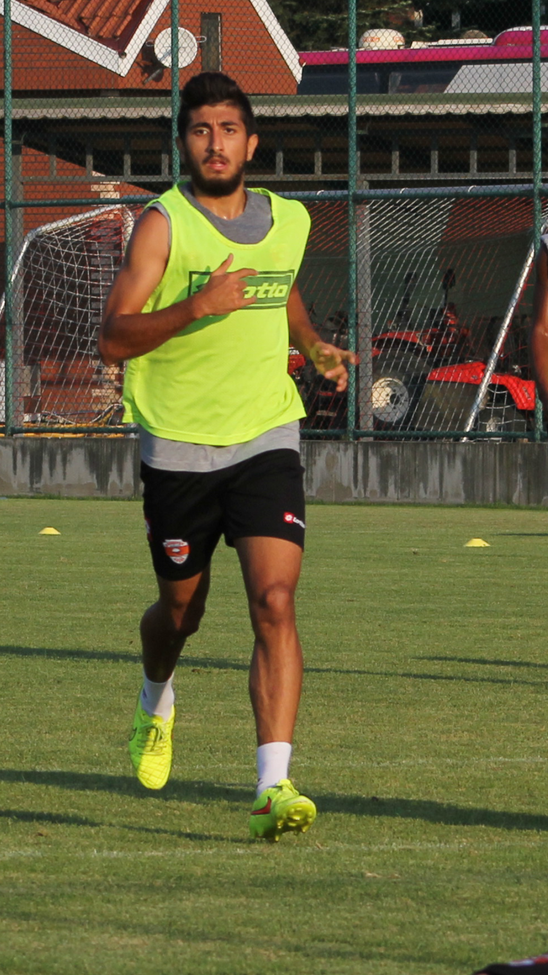 Emre Uğur Uruç